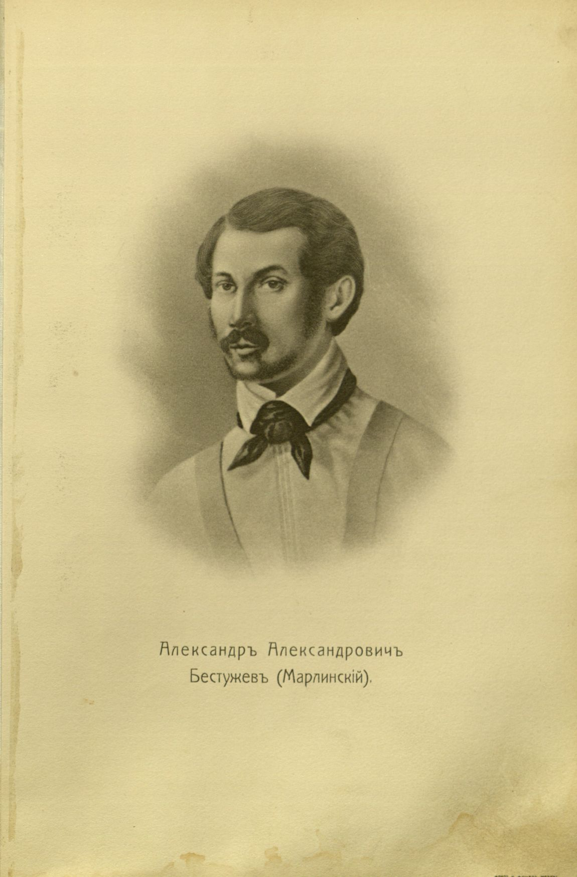 Головачев, П. М. Декабристы : 86 портретов, вид Петровского завода и 2 бытовых рисунка того времени. - М., [1906] Aleksandr Bestuzhev